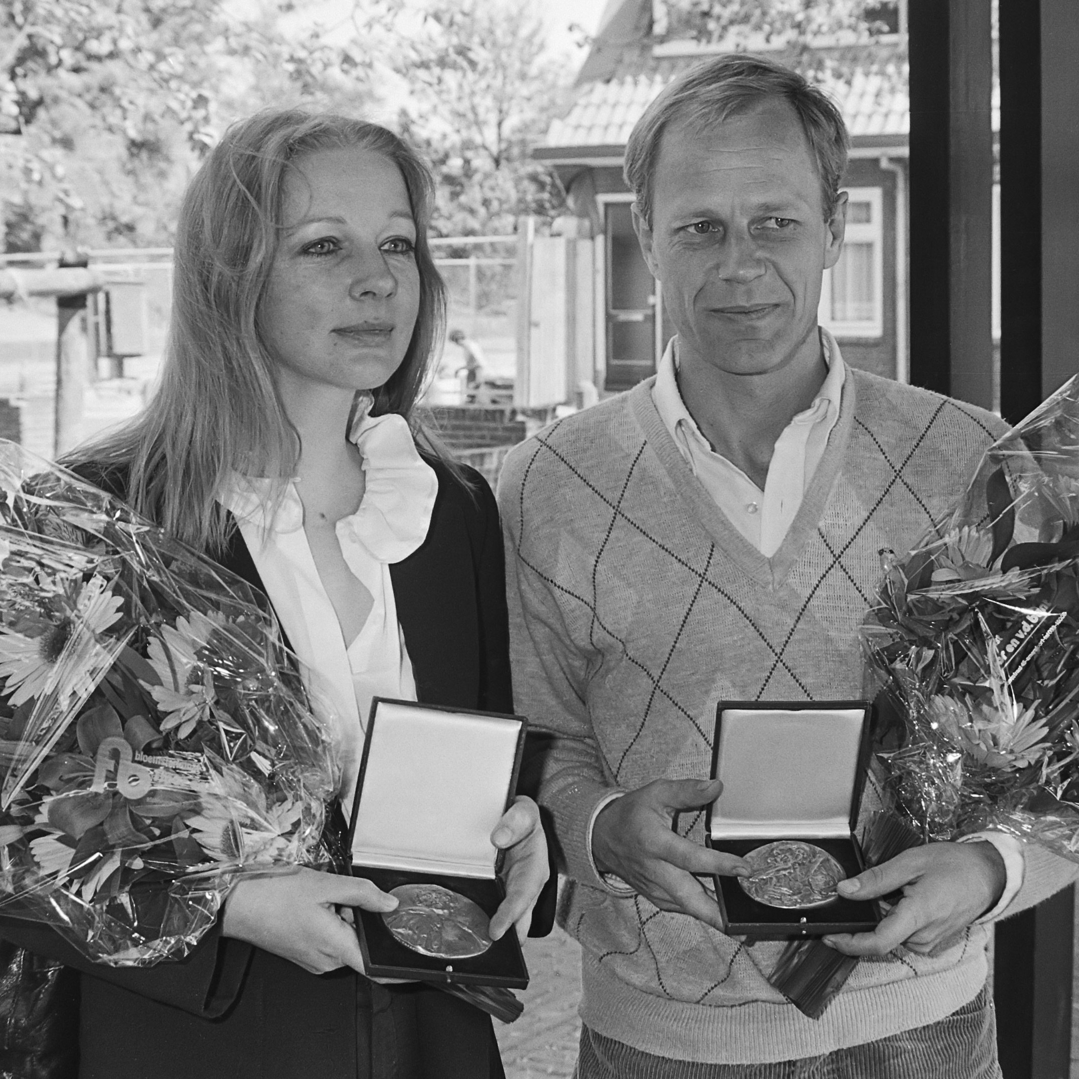 Uitreiking toneelprijzen in Amersfoort; Joop Admiraal (met Louis d'Or prijs en Marjon Brandsma (l) met Theo d'Or prijs) 13 mei 1982